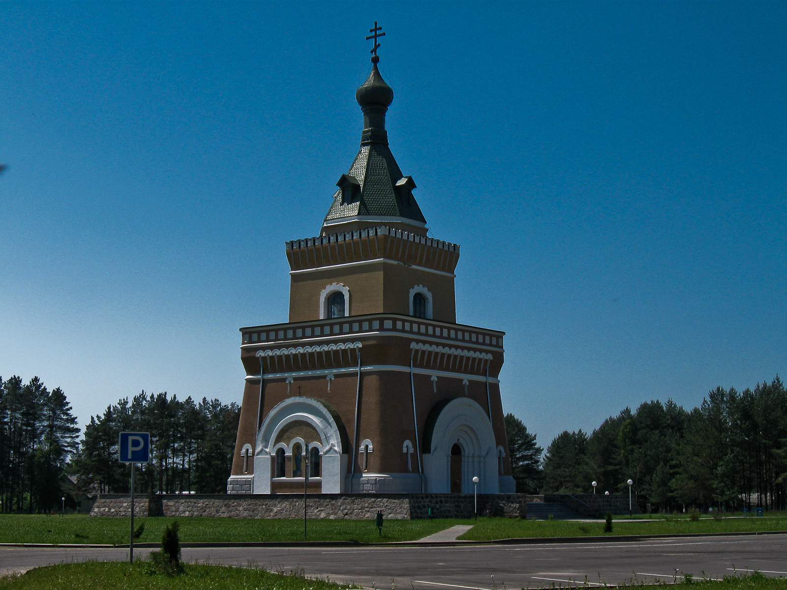 Беларуская (тарашкевіца): Сьвята-Петра-Паўлаўскі храм-помнік:іканастасдва ківотымазаічны абраз «Казанская ікона Божай Маці» (майстэрня Фралова)мазаічны абраз «Апостал Пётар» (майстэрня Фралова). в. Лясная This is a photo of Belarusian heritage monument. Reference number: 511Д000531 ( WLM)